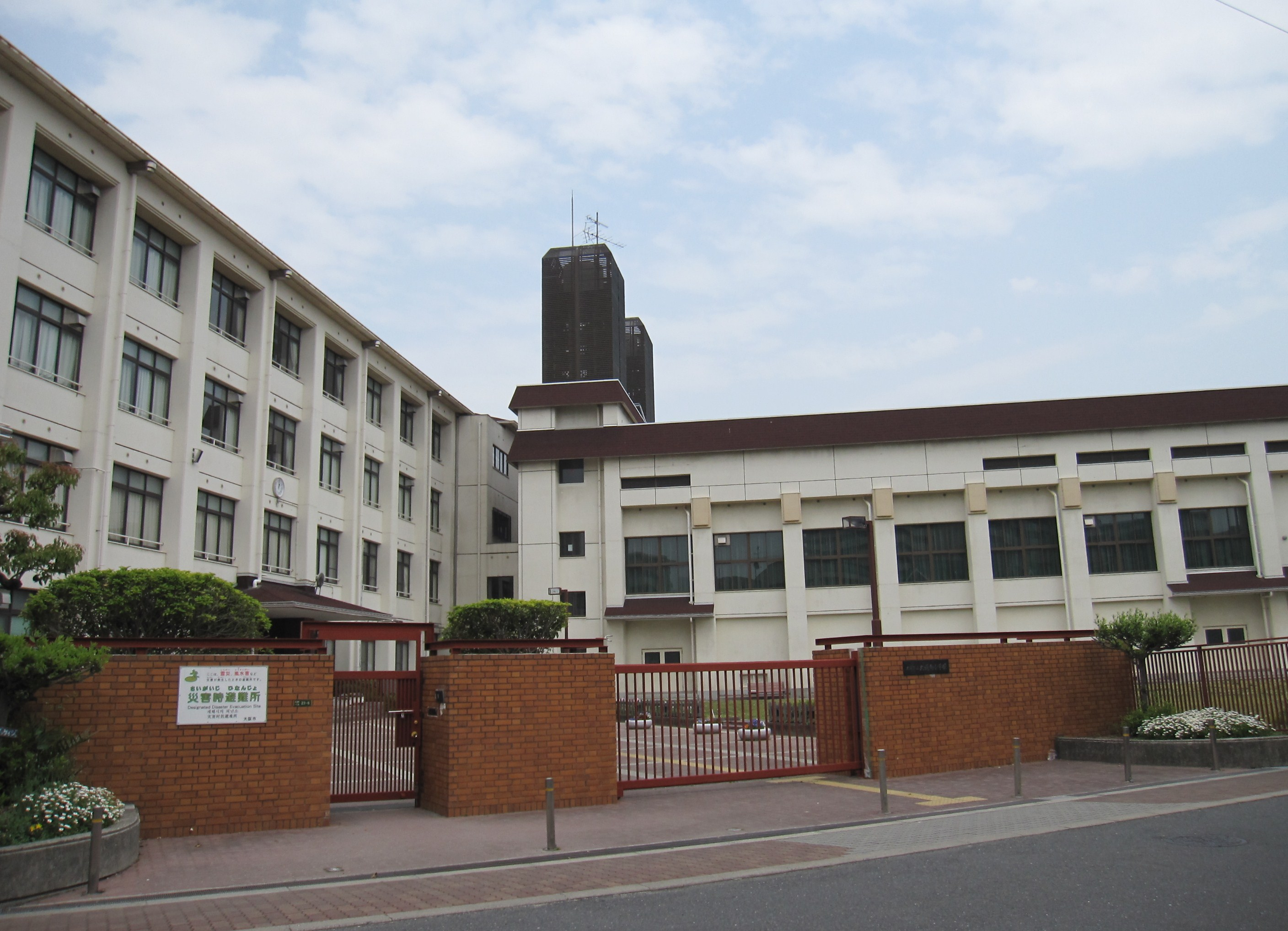 大阪市立大道南小学校